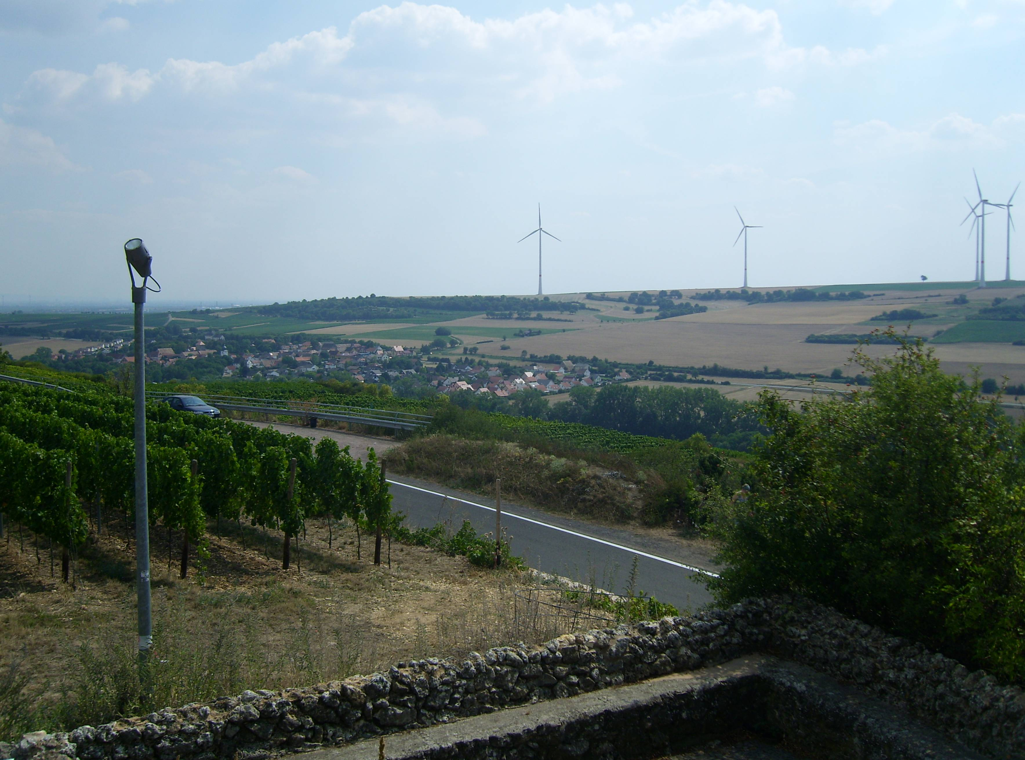 Mittleres Pfrimmtal (Alzeyer Hügelland) bei Wachenheim vom Ehrenmal Zellertal (etwa 240 m); rechts der Kahlenberg (bis 305,6 m), links Rheinebene und Odenwald (kaum sichtbar)